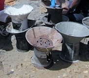 brasero